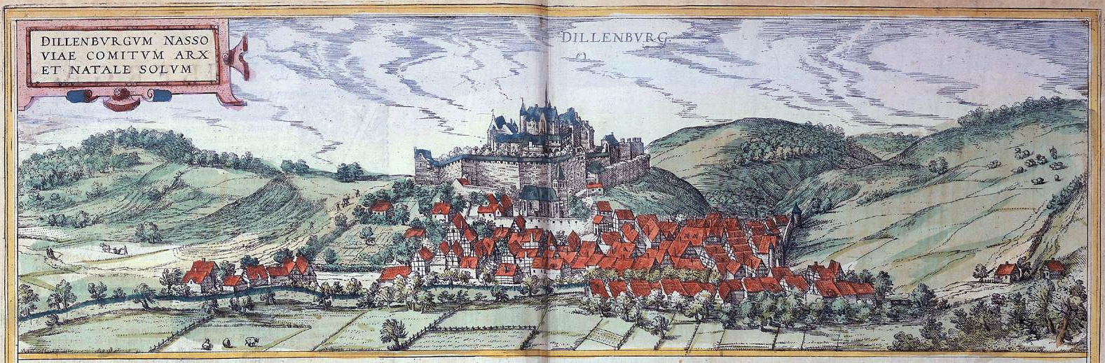 Gezicht op Dillenburg. Ingekleurde gravure. Onderdeel van een grotere gravure voorstellende Dillenburg (boven) en Siegen (onder), Rijksmuseum Amsterdam ( inv.nr. BIBL-325-A-7).